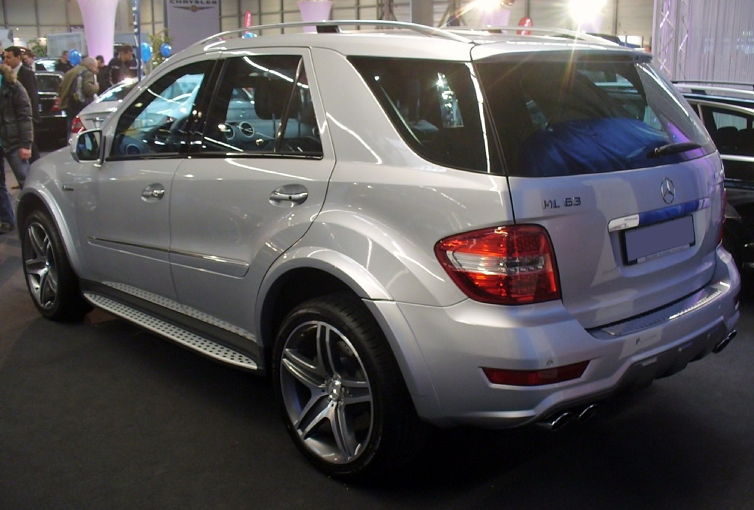 Mercedes-Benz ML 63 AMG